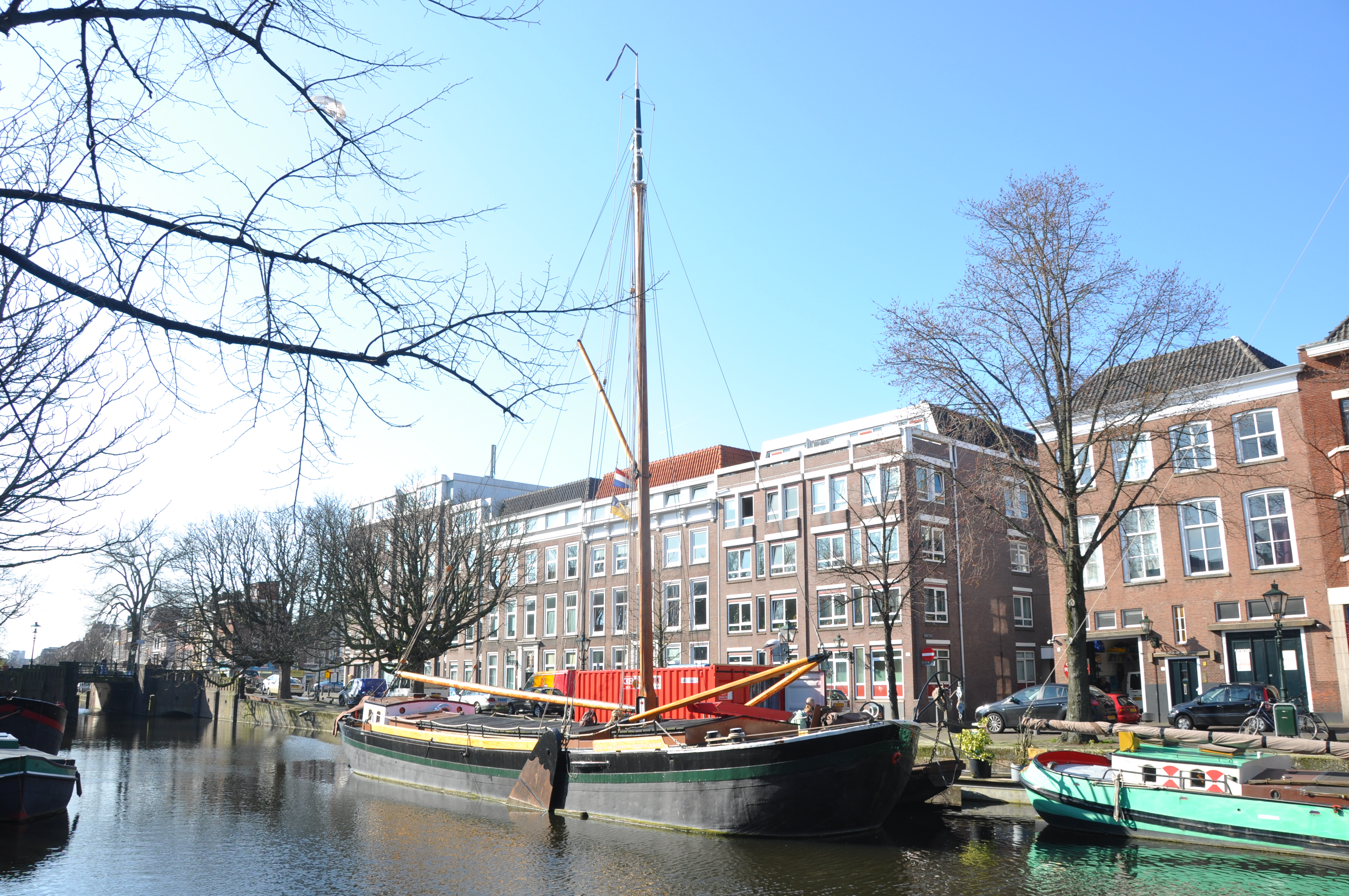 De HENDRINA JOHANNA voor de wal aan de Bierkade in Den Haag.